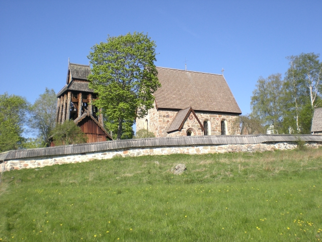 En Bild av Trönö gamla kyrka, Norrlands bäst bevarade medeltida kyrka.